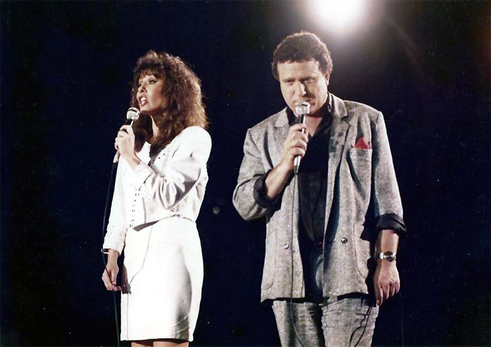 ירדנה ארזי בסיבוב הופעות משותף עם יהורם גאון שנערך בחסות האגודה למען החייל. בשנת ה-40 למדינה 1988